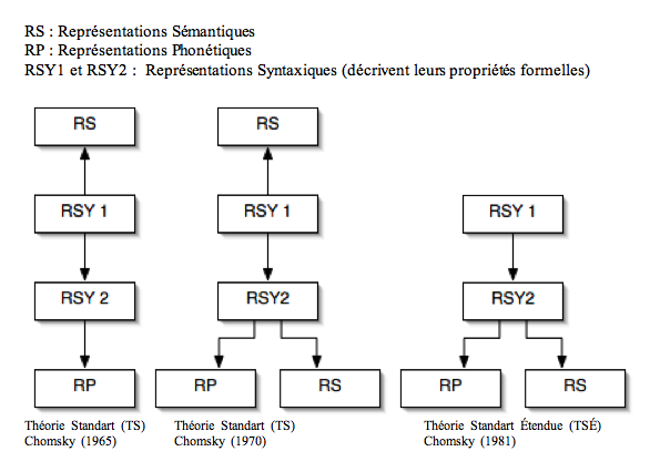 Tableau récapitulatif des hypothèses sur les interractions entre modules cognitifs selon la linguistique générative